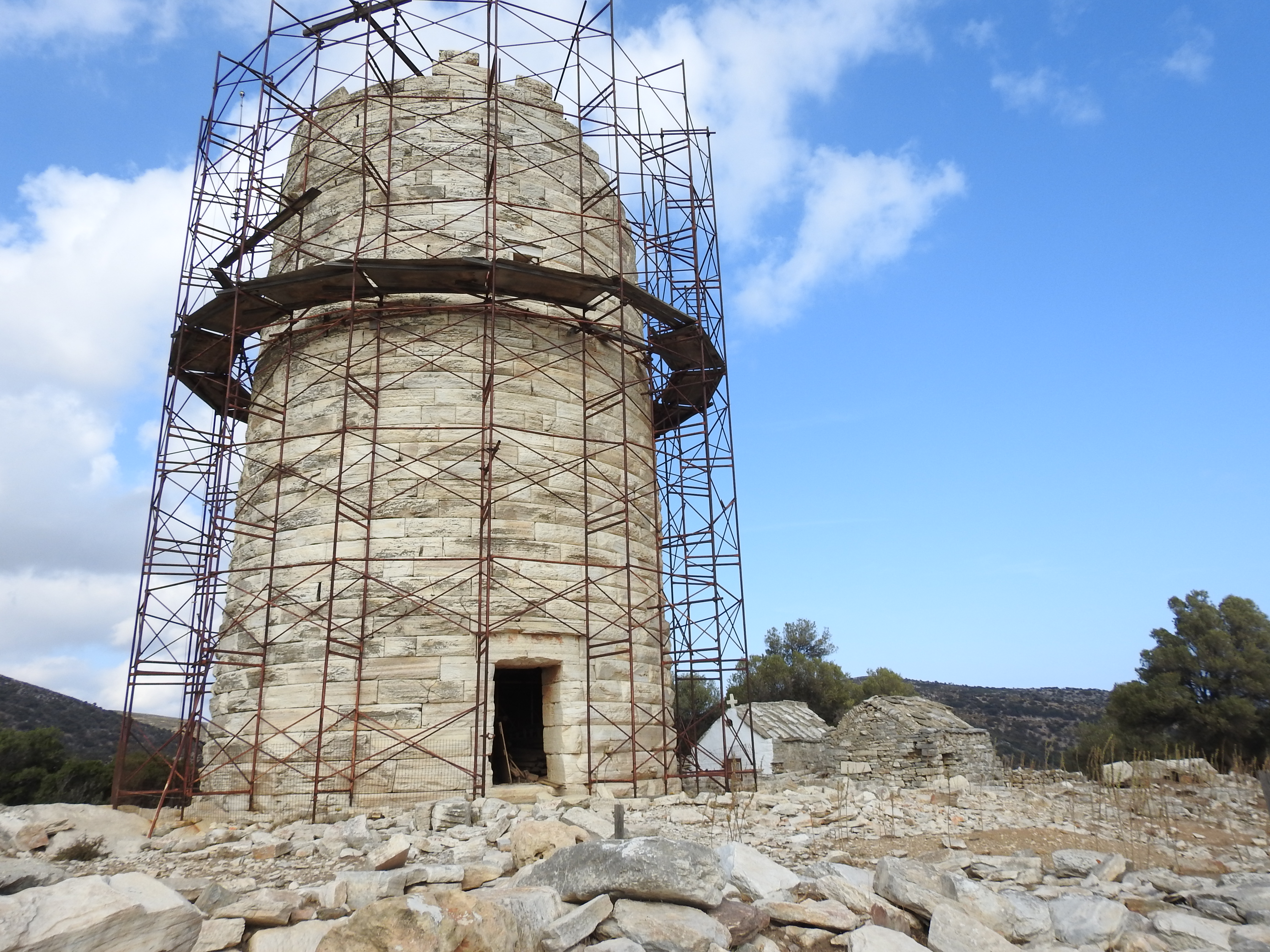 ο Πύργος του Χειμάρρου με τις εκκλησίες δίπλα του«Πύργος Χειμάρρου»